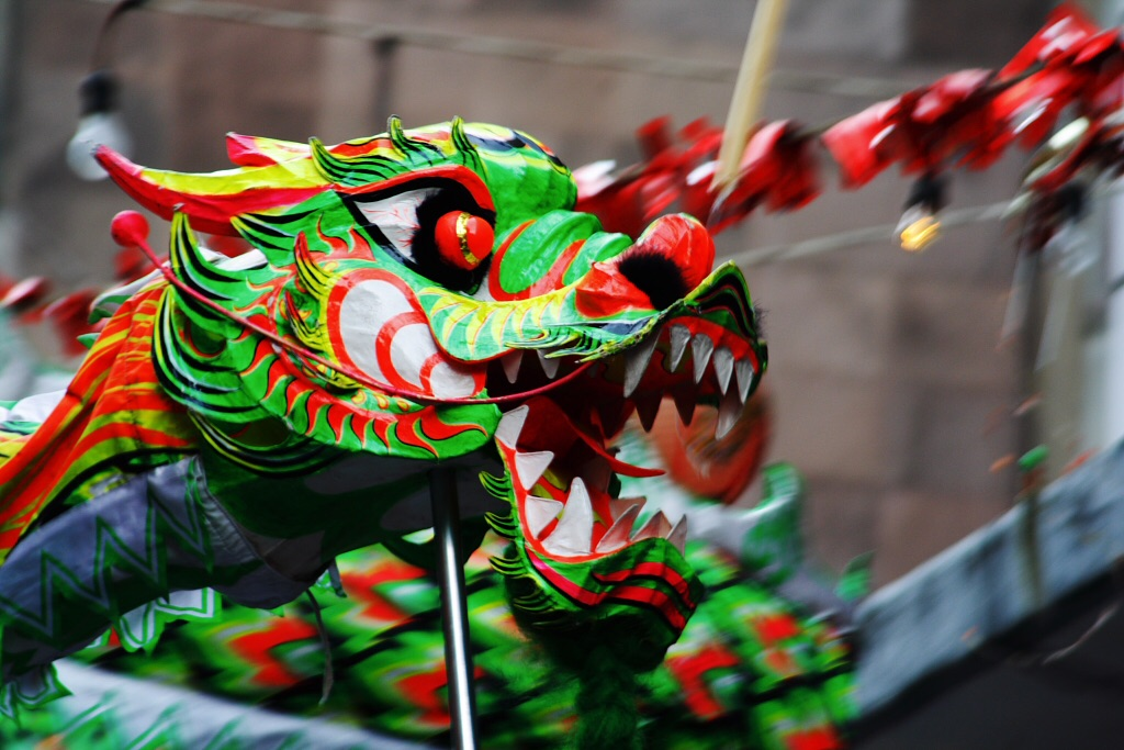 Durante las celebraciones del Año Nuevo Chino 2008 (año de la rata) Referrer(s) / used on